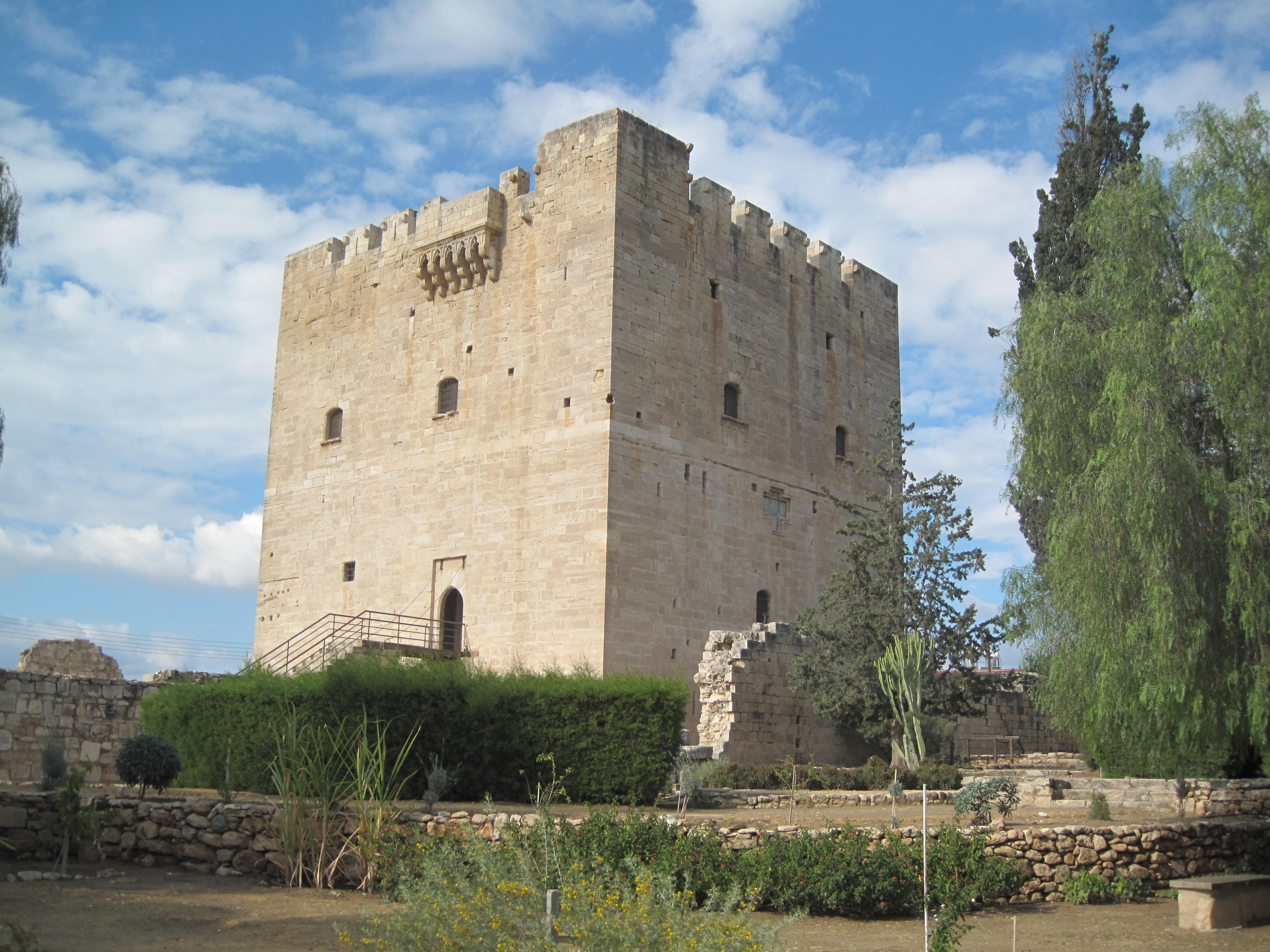 Cyprus - Kolossi kasteel 13